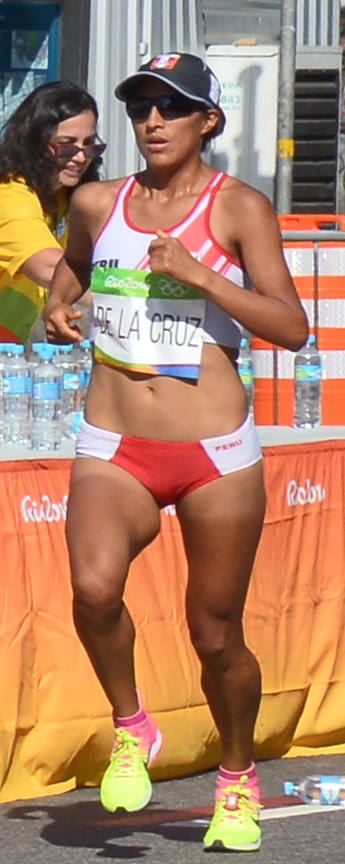 Passage du marathon des jeux olympiques de Rio 2016 dans le centre de Rio